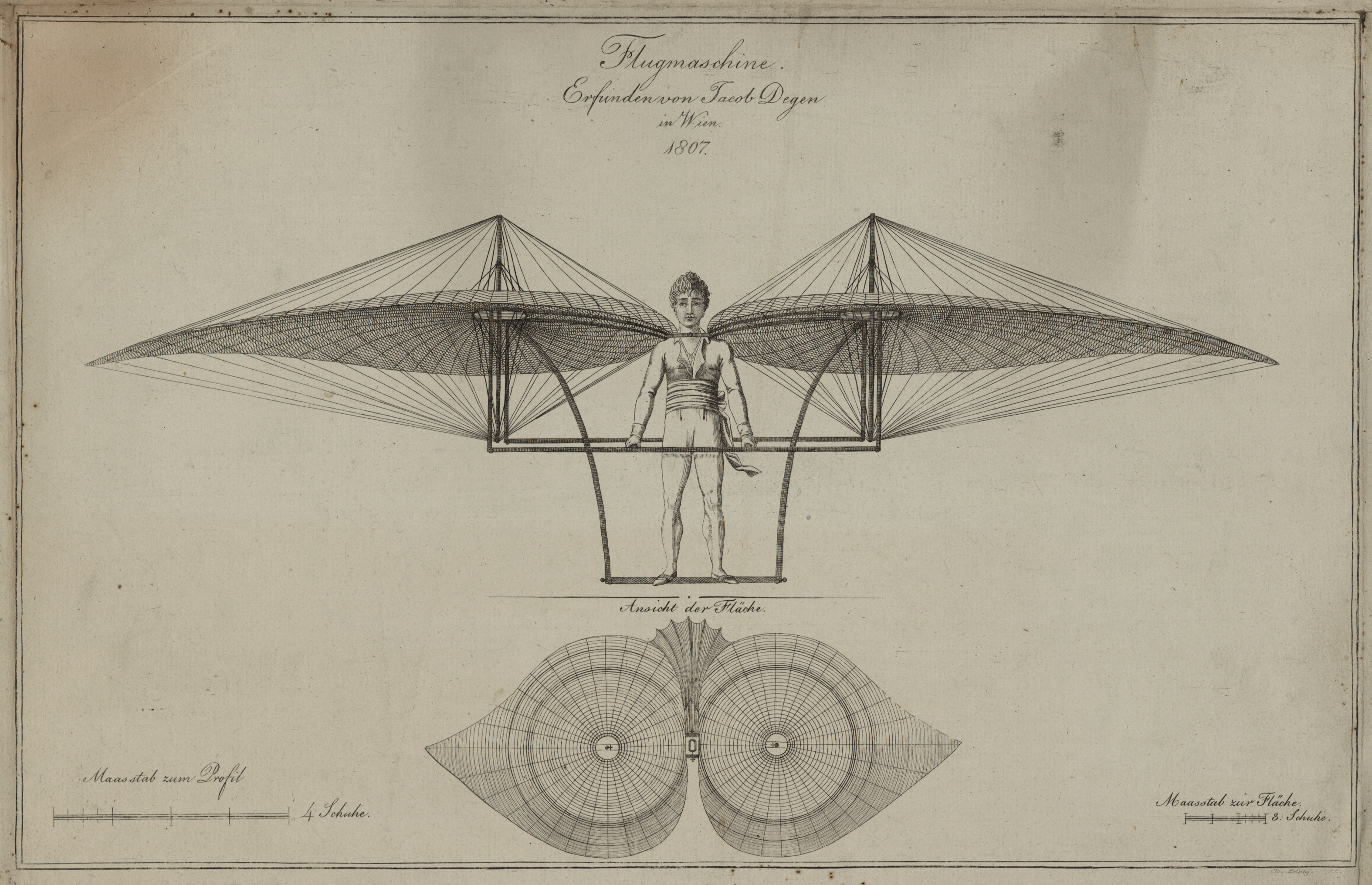 Von Jakob Degen entworfener Ornithopter (Schwingenflügler, bzw. Schlagflügelflugzeug)